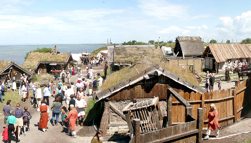 The Viking museum of foteviken in Skania, Sweden.